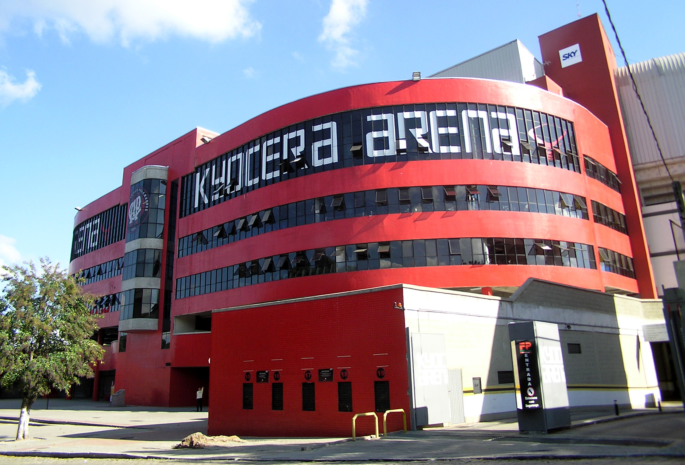 Arena da Baixada.The home of Clube Atlético Paranaense.